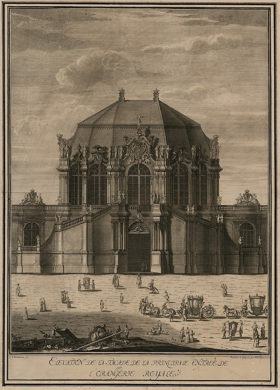 Aufriss des Stadtpavillions (heute: Glockenspielpavillon) im Zwinger in Dresden. Kupferstich von Christian Albrecht Wortmann 1729; herausgegeben von Matthäus Daniel Pöppelmann in seinem Kupferstichwerk über den Zwinger. Originaltitel: "Elevation De La Facade De La Principale Entree De L'Orangerie Royale"